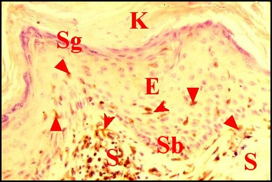 Epithélium d'un cholestéatome dans lequel pénètrent des cellules de Langherans provenant du stroma.